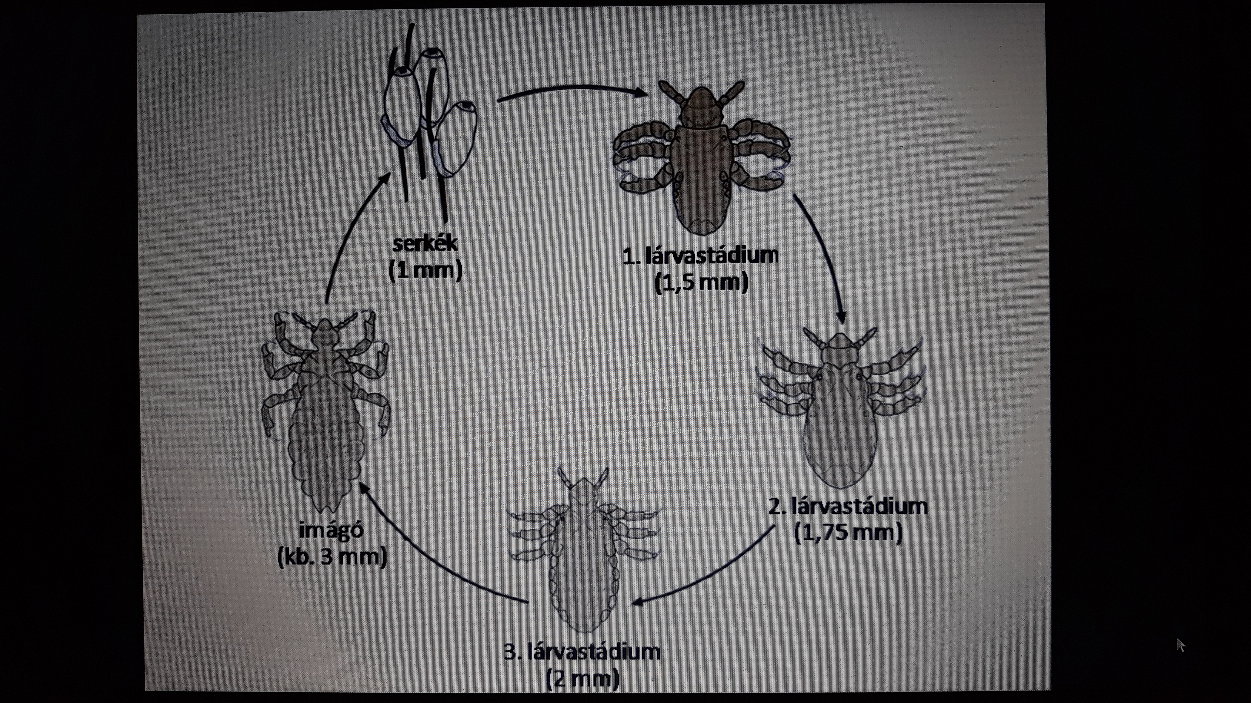 A négy státdium